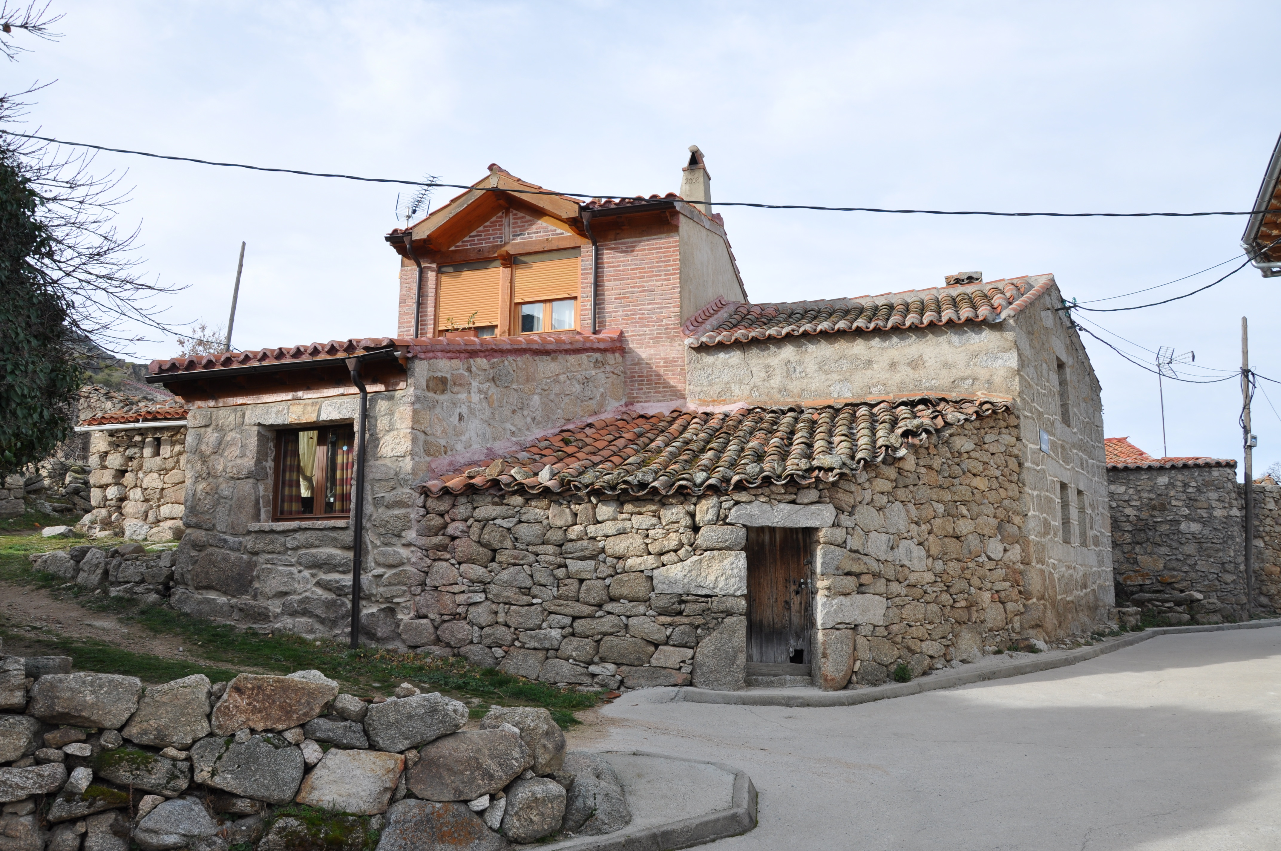 Casas en el Barrio de Arriba, Pradosegar, AV, España